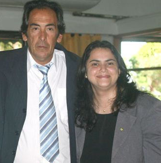 Presidente Mario Gimenez (Uruguai) e Vice Presidente Gina Anjos (Brasil) da Confederação Sul-Americana de Futebol de Salão (2014-2018).